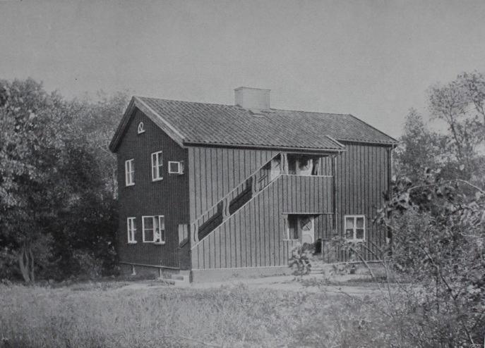 Statarebostäder Åkeshov 1917